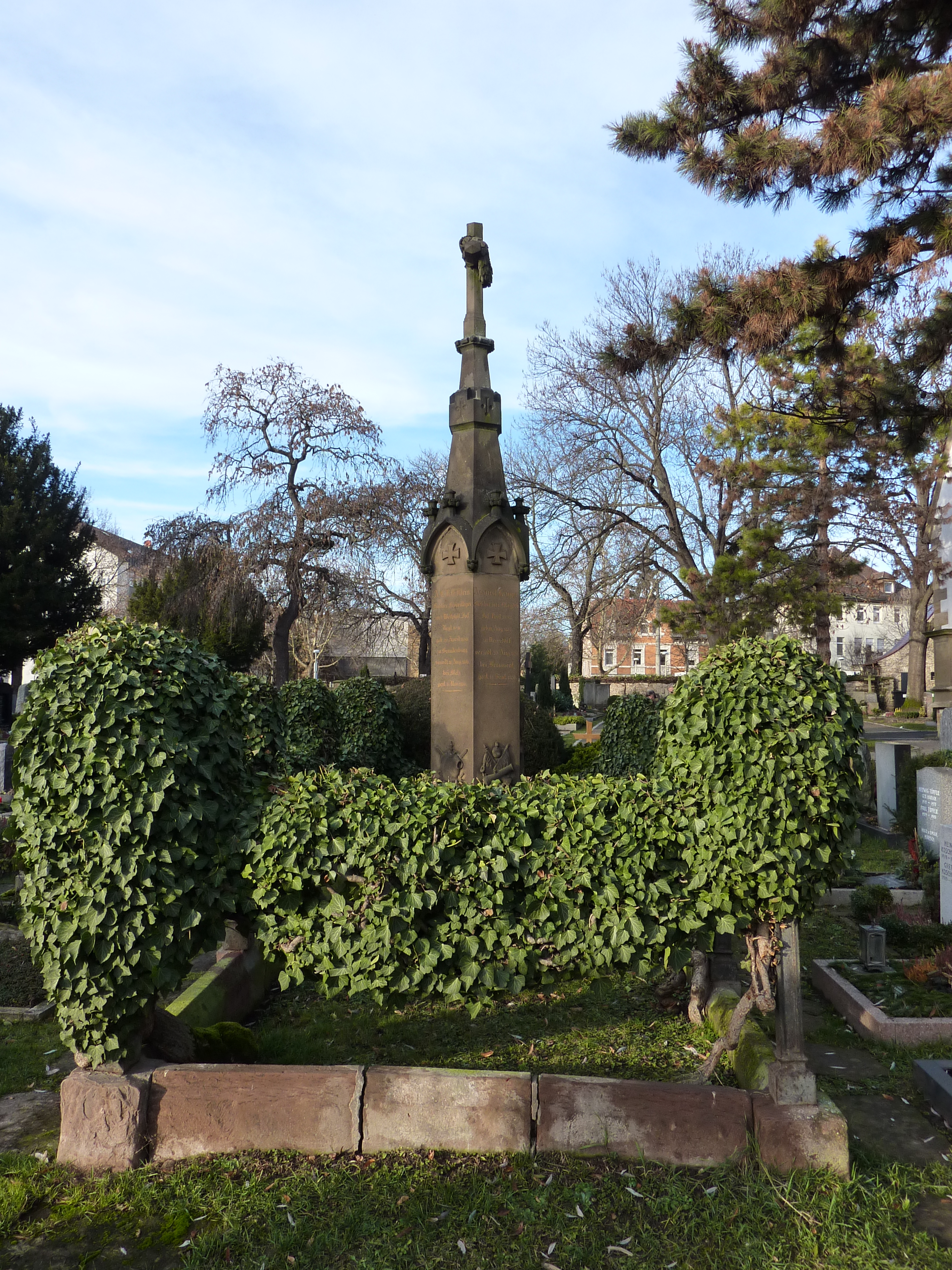 Kriegerdenkmal auf dem Uff-Kirchhof